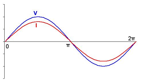 O gráfico mostra as ondas de tensão e corrente em fase - nesse caso o fator de potência é unitário e a carga é puramente resistiva.